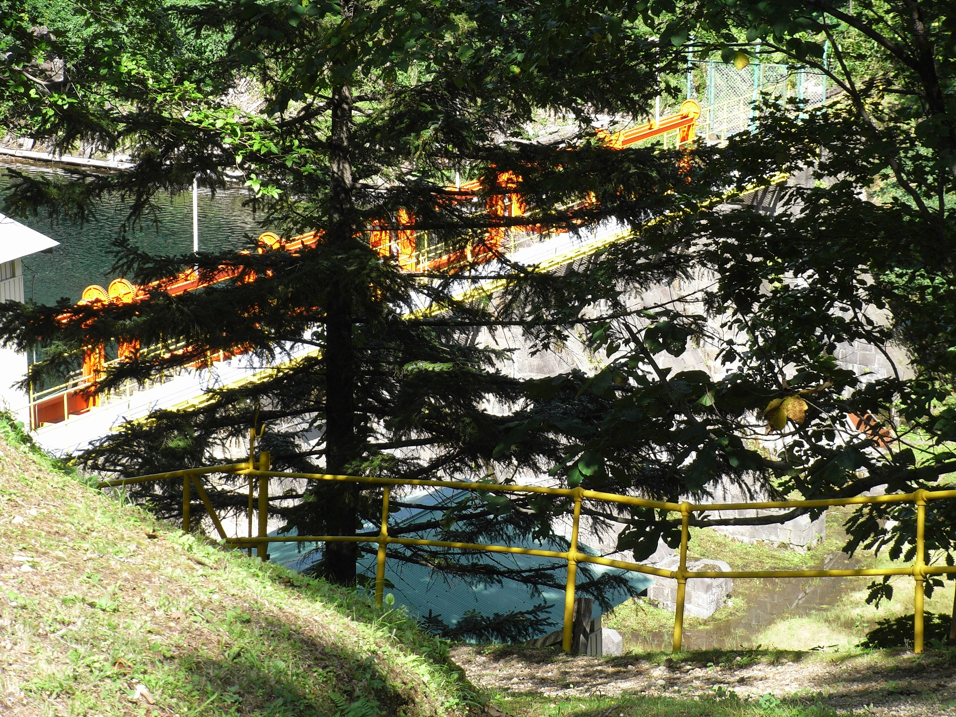 Dam